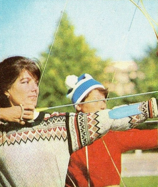 MUNCHEN 72-Figurina-Stickers-Panini-N° 18-GAPCENKO recuperata